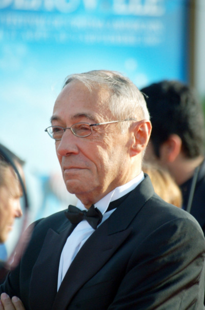 André Téchiné au festival du film américain de Deauville